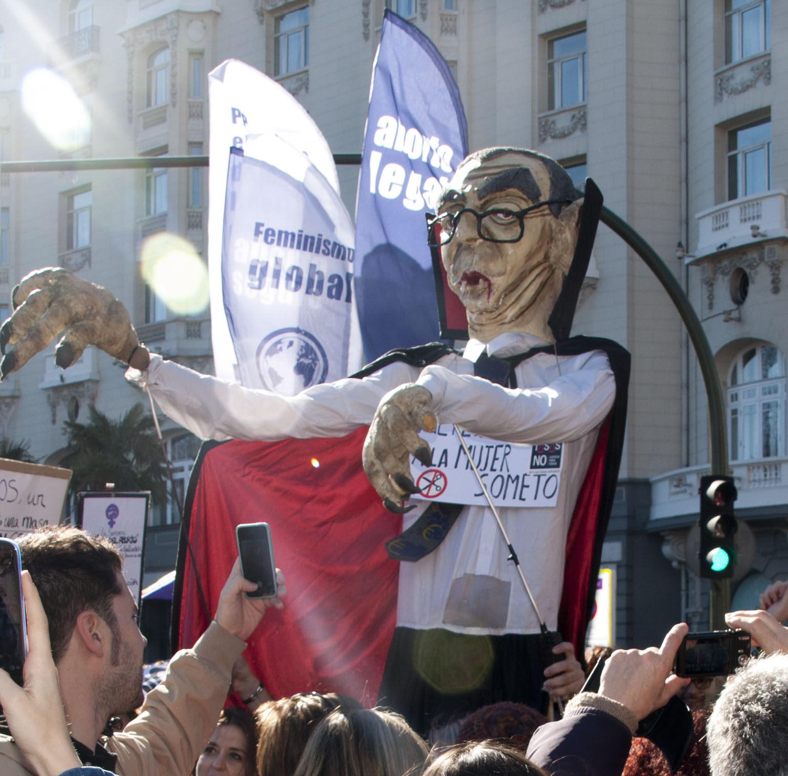 El tren de la libertad. Una de las mayores movilizaciones del movimiento feminista en España, para reivindicar el derecho a decidir de las mujeres. Arrancó de Gijón hasta Madrid con parada en Valladolid.